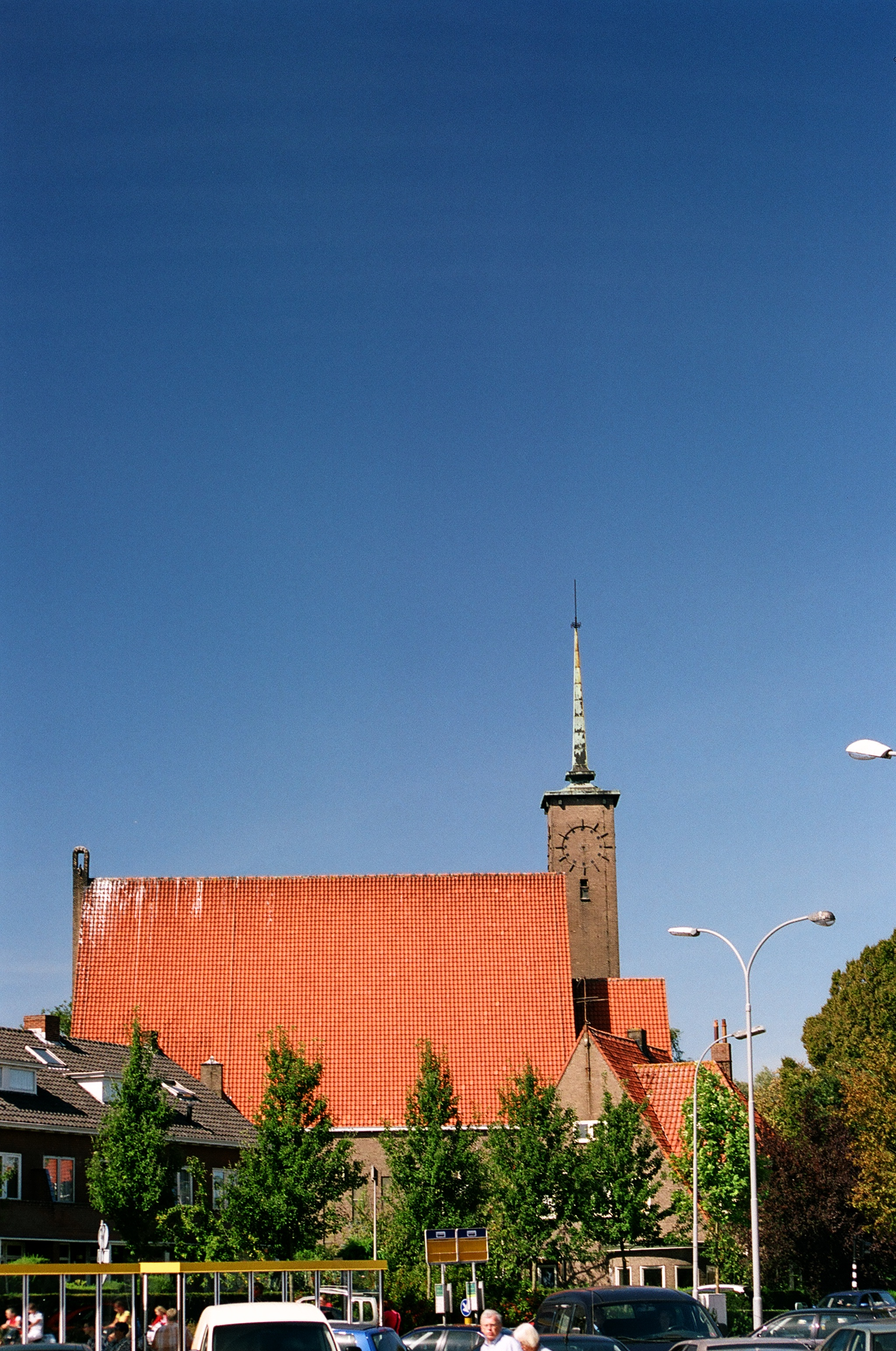 Westerkerk, Goes